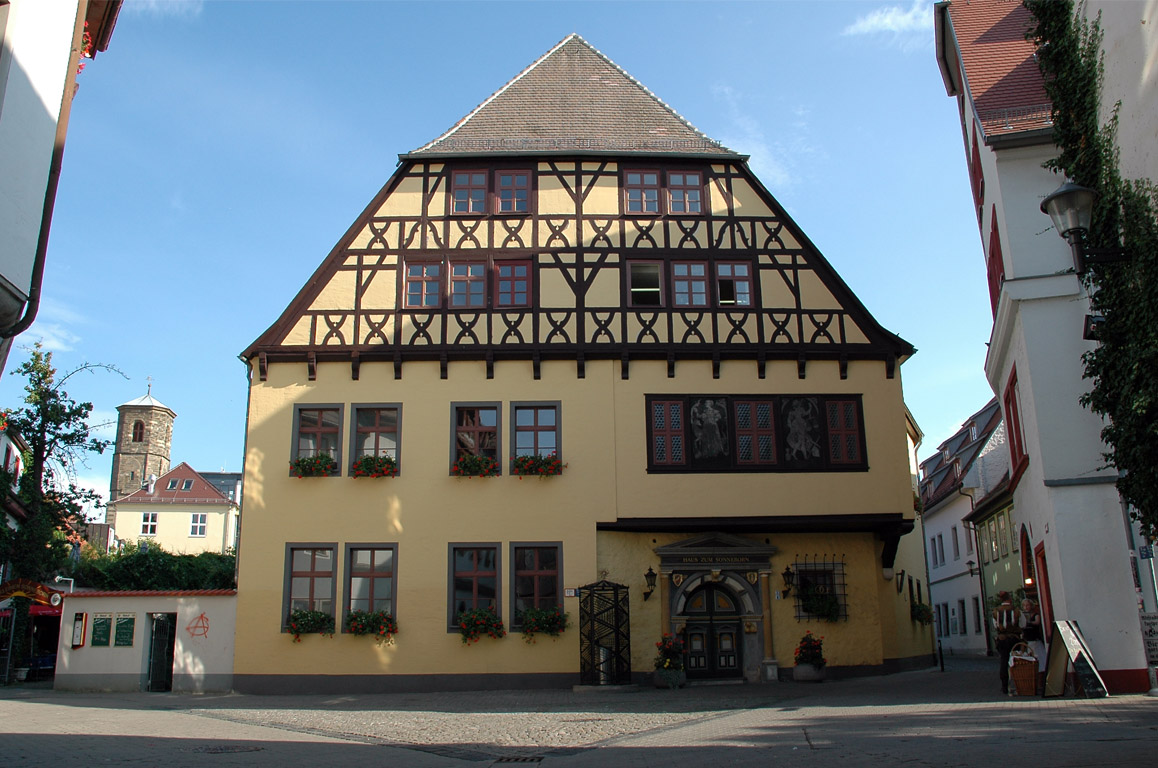 Haus zum Sonneborn (errichtet 1546)